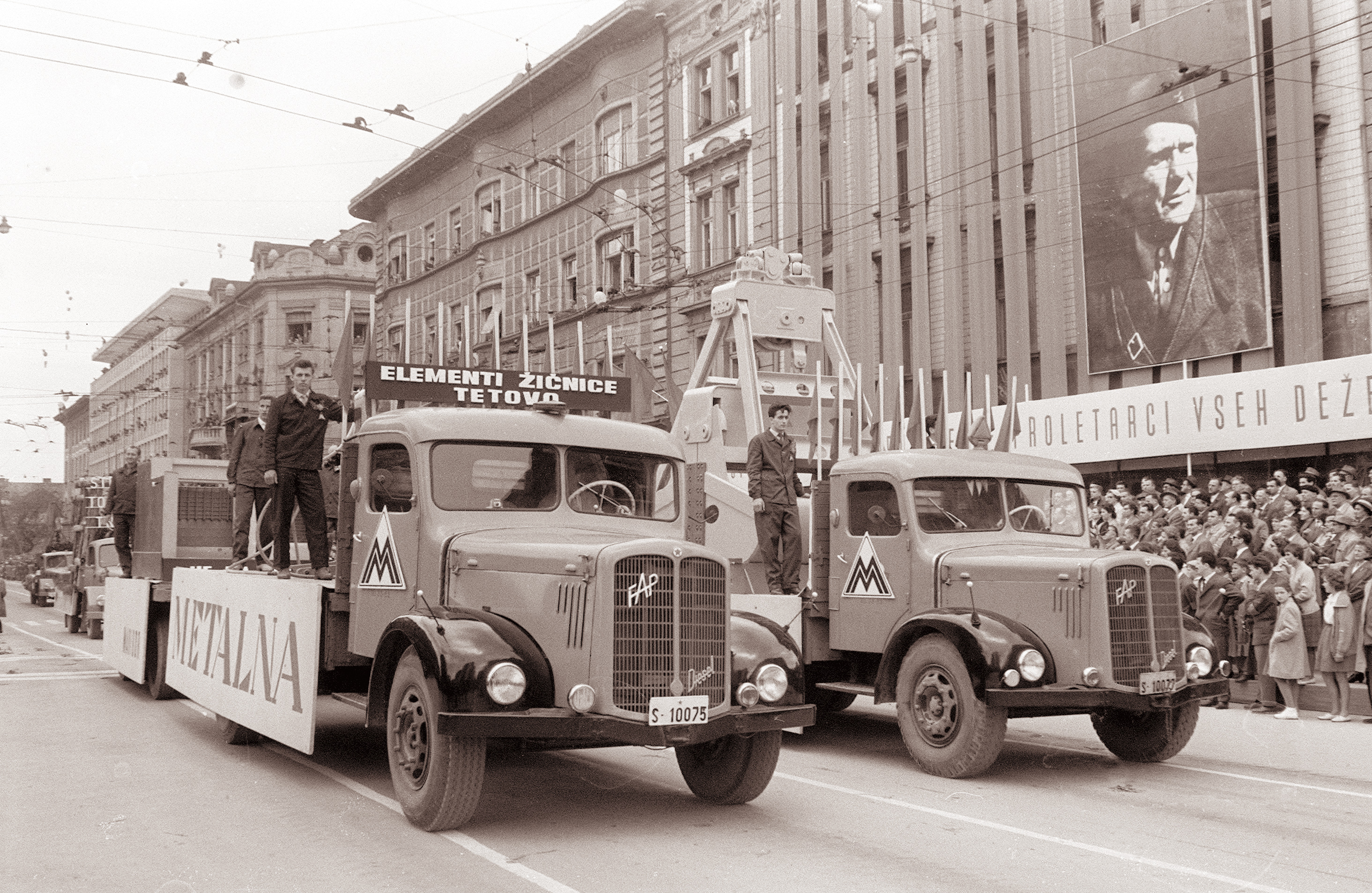 Prvomajski sprevod v Ljubljani